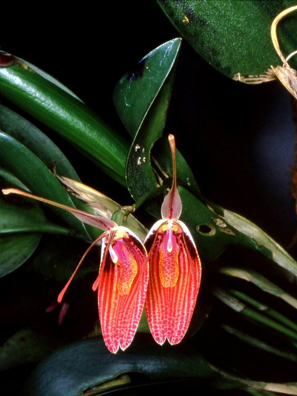 Restrepia sanguinea - flowers